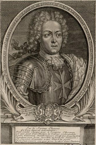 Jacques François de Chambray (1687-1756), lieutenant-général des armées du Roi, Vice-amiral de l'ordre de Malte